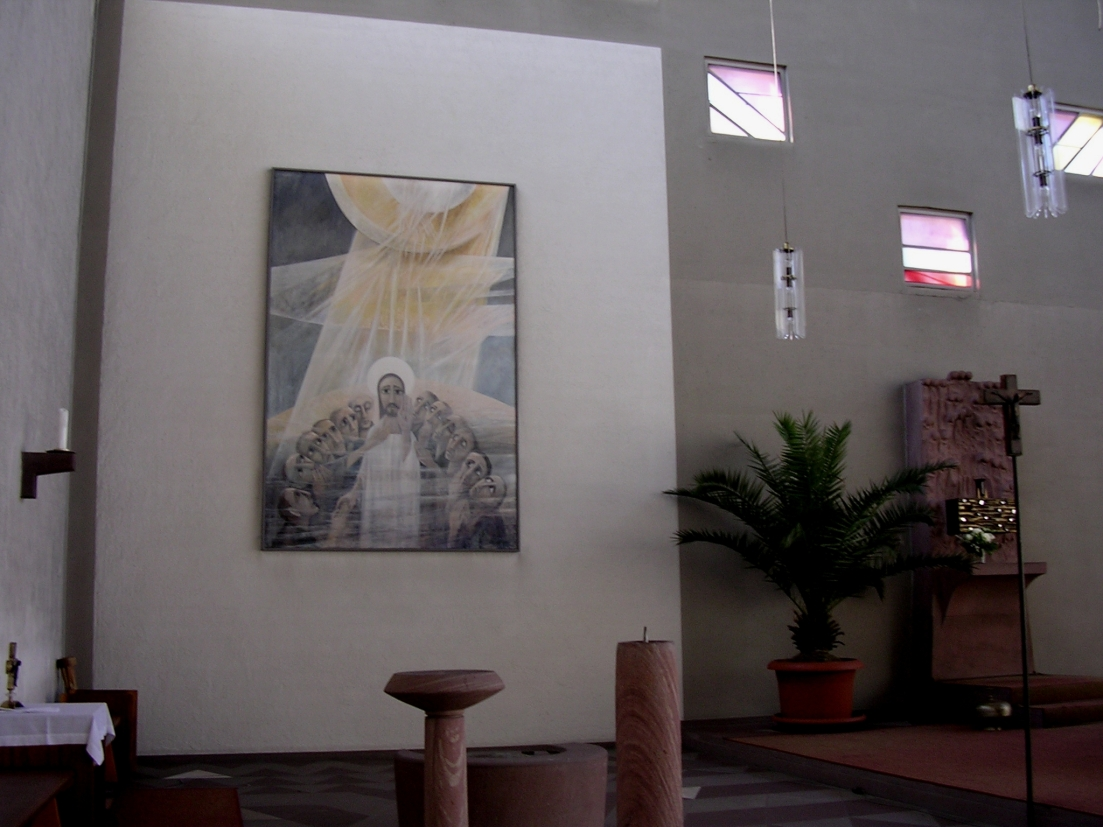 St. Gertrud Aschaffenburg Osterbild Aussendung der Apostel (Siegfried Rischar)